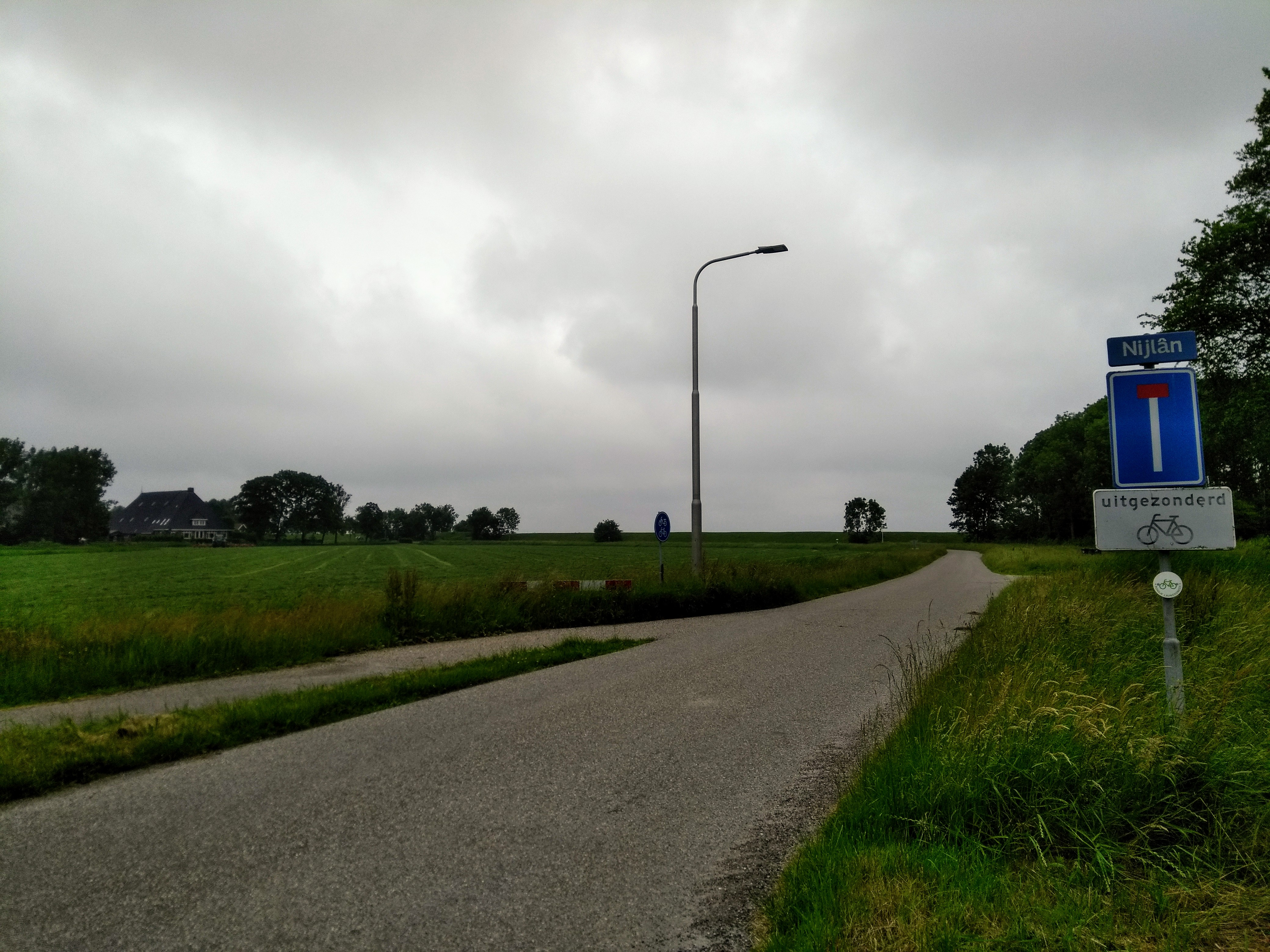 Zicht op de buurtschap Nieuwland in de gemeente Dongeradeel.